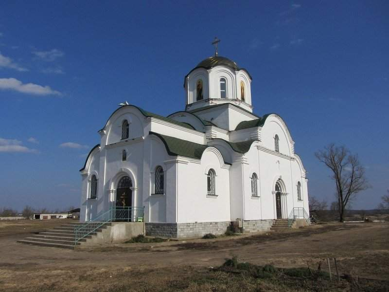 Адноўленая царква ў Баркалабаўскім Свята-Узнясенскім жаночым манастыры